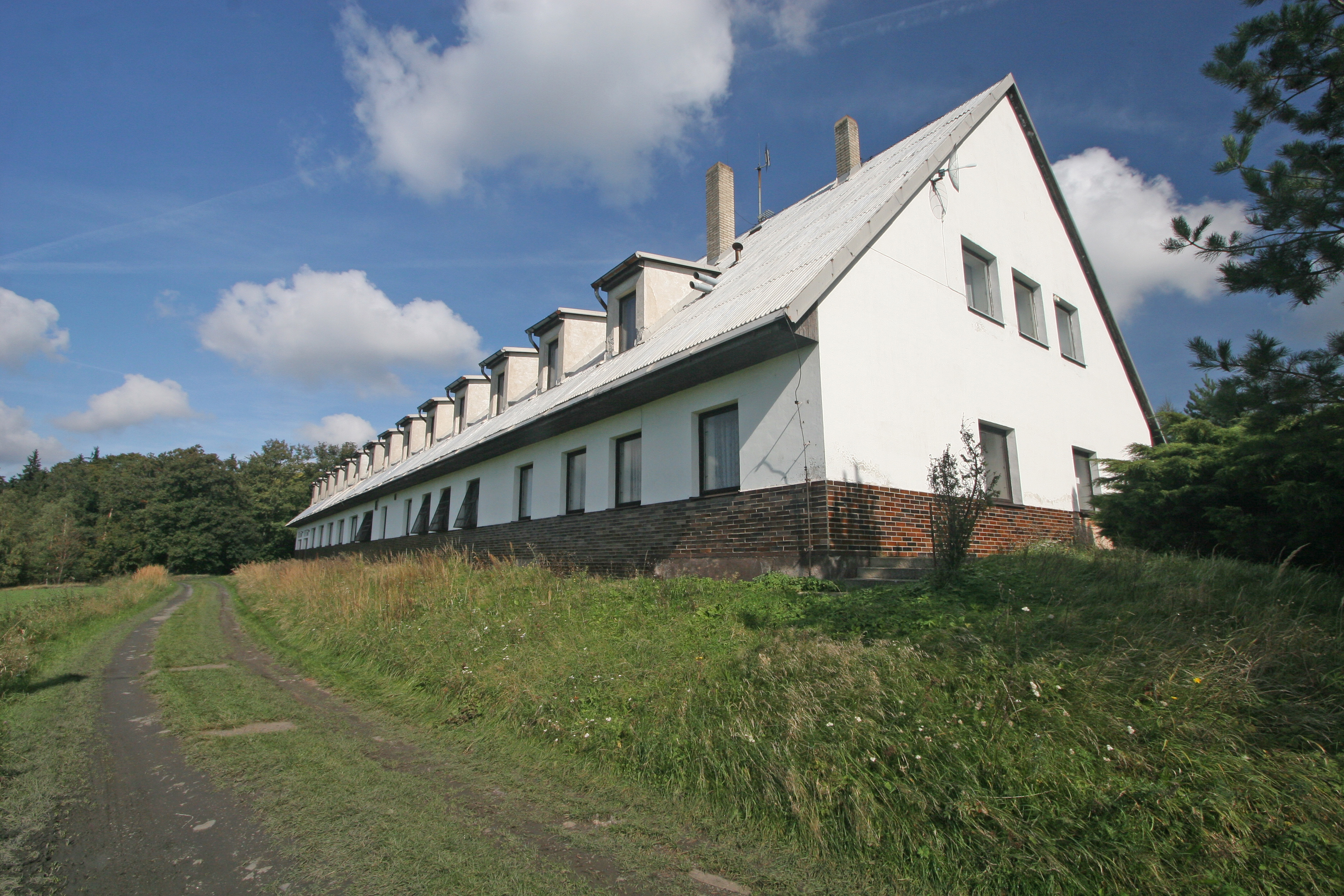 Zbyslavec čp. 21